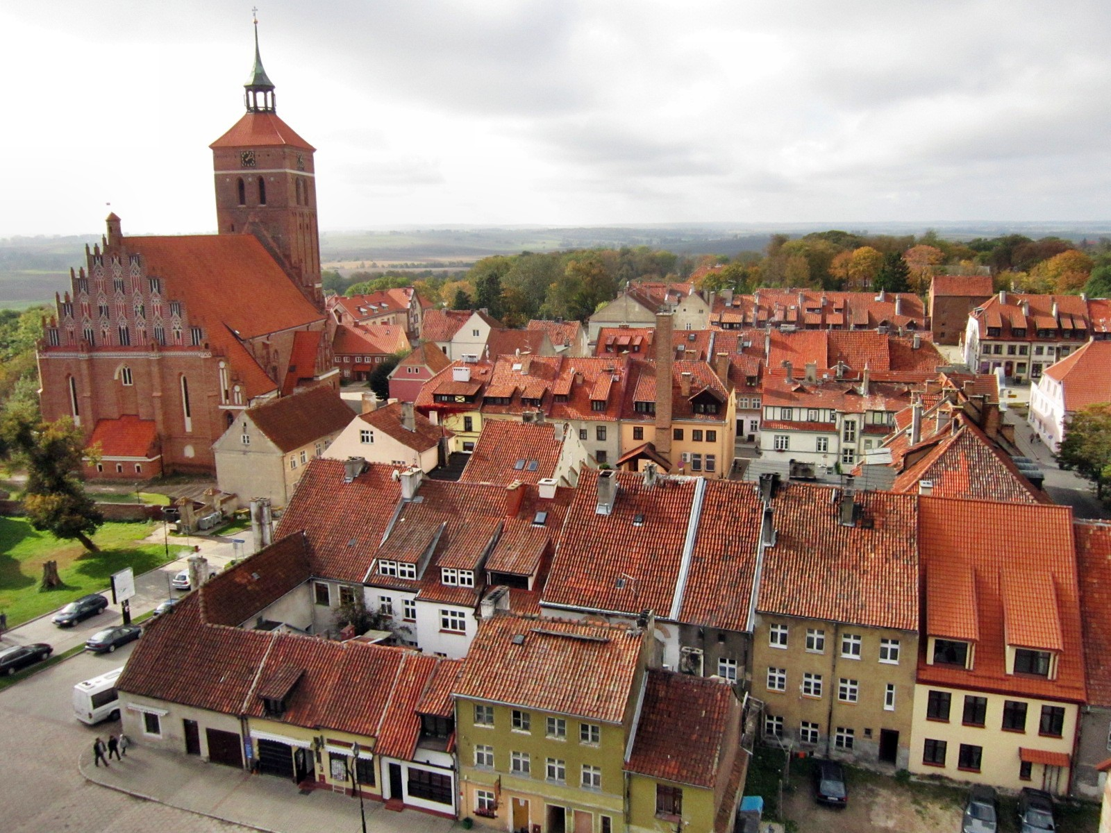 Reszelska Starówka-część południowa 2011-10-09